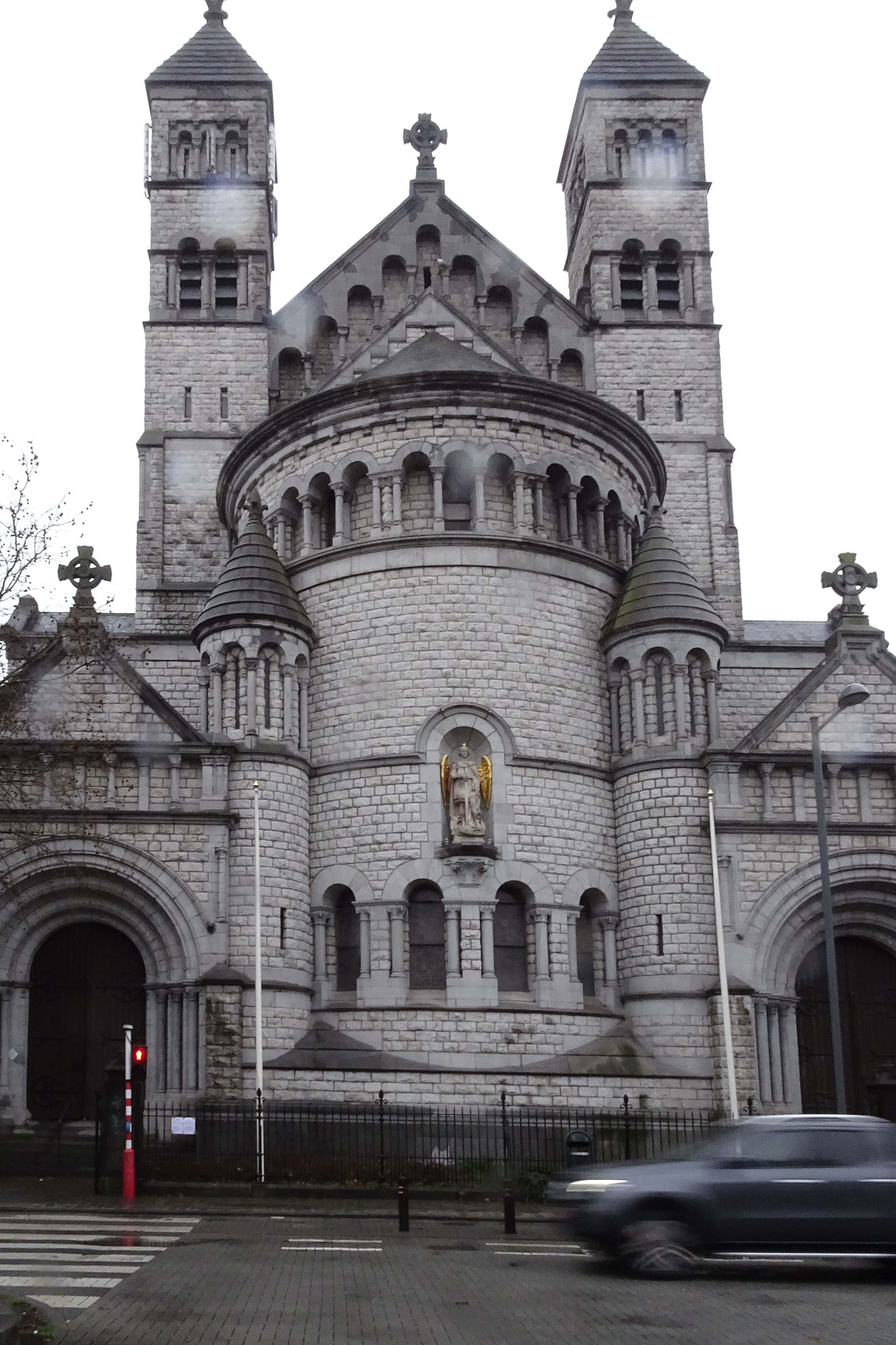 Collège